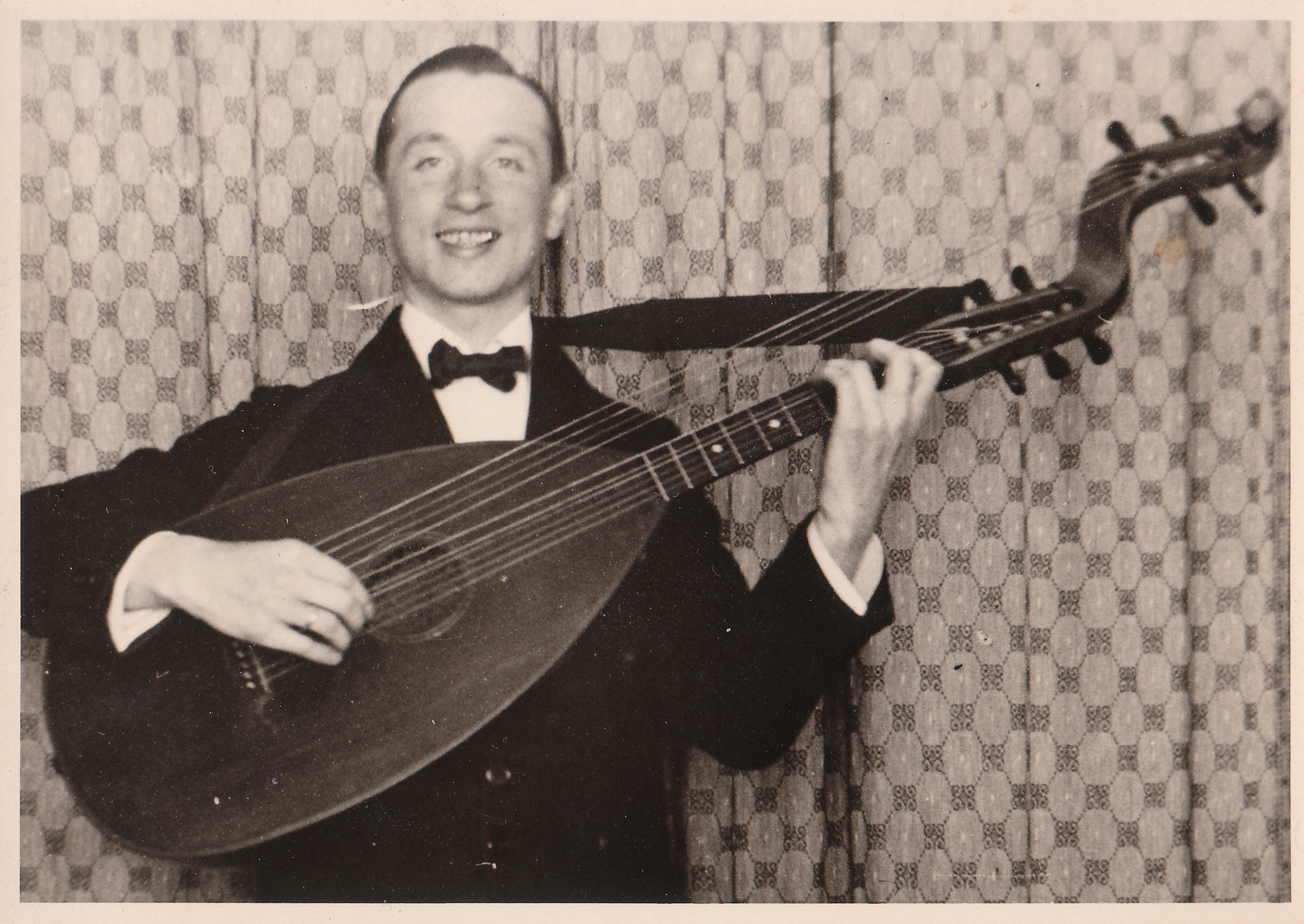 Der Musiklehrer Theodor Krüger beim Spiel mit historischem Saiteninstrument in seinem Musikzimmer in Celle, Am Heiligen Kreuz 27 ...